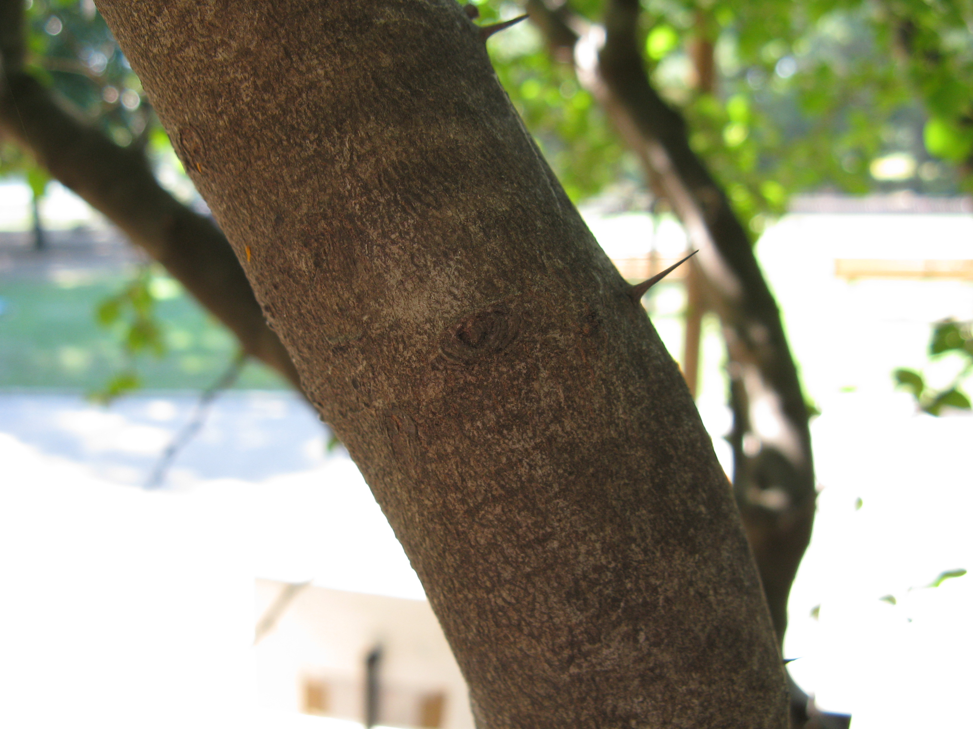 Scientific name Paliurus ramosissimus